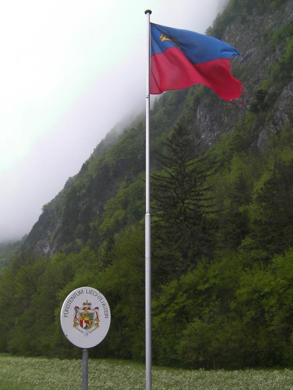 The border between Switzerland and Liechtenstein